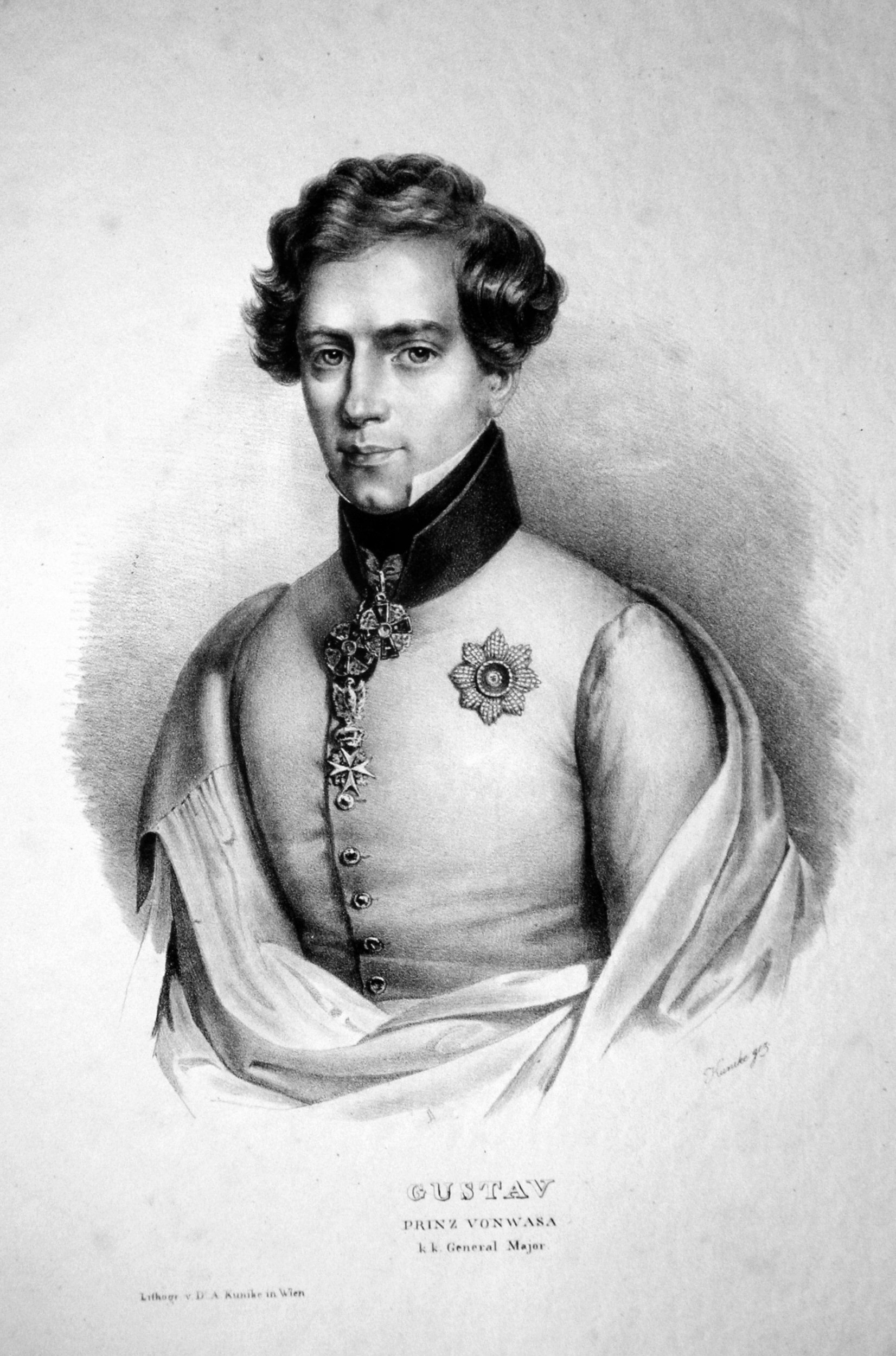 Gustav Prinz von Wasa (1799-1877), Kronprinz, k. k. Feldmarschallleutnant. Lithographie von Adolph Friedrich Kunike, ca. 1830